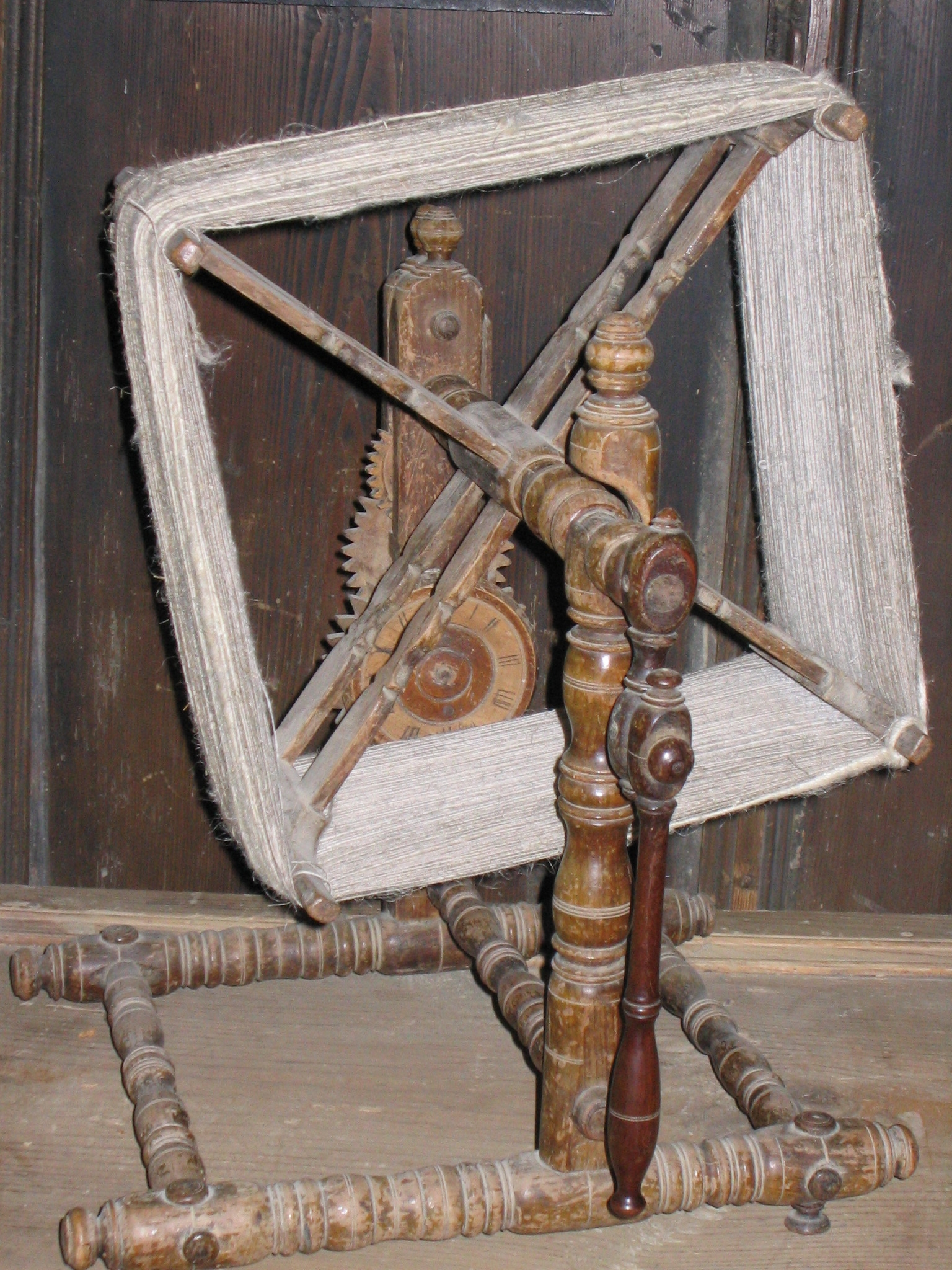 Haspel im Freilichtmuseum Neuhausen ob Eck